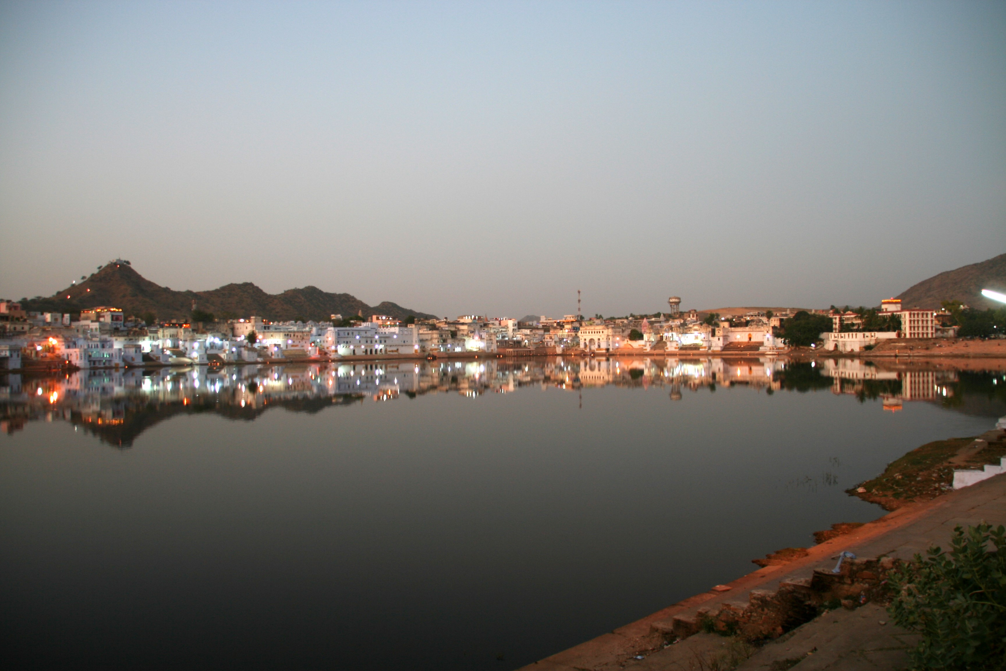 Evening lights by the Pushkar Lake, Pushkar.